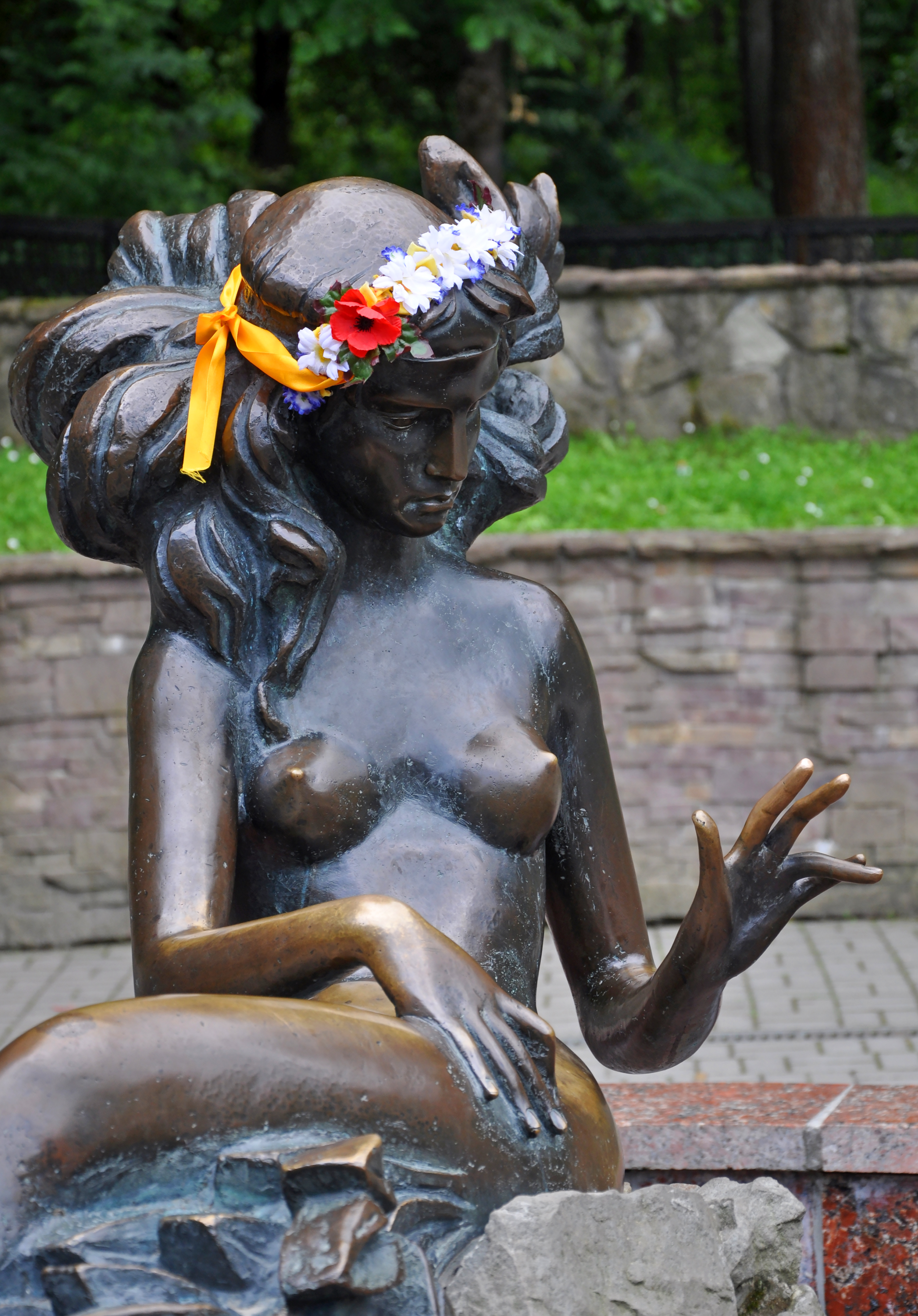 Джерело № 11 (колишня «Юзя») курорту «Трускавець», м. Трускавець